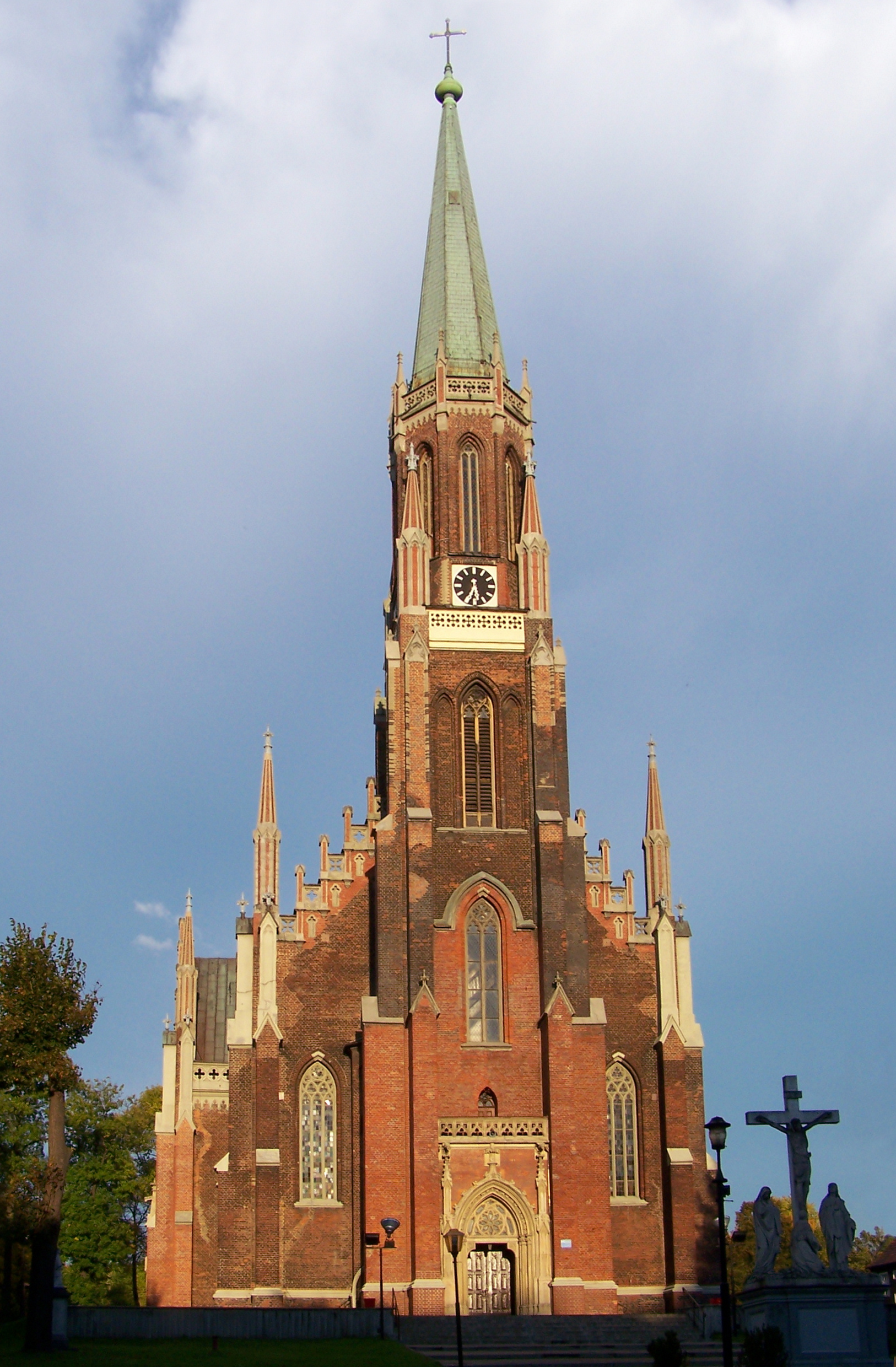 Kościół pw. św. Krzyża w Miechowicach (dzielnica Bytomia). Wybudowany w latach 1856-1864 w stylu neogotyckim wg projektu Augusta Sollera.